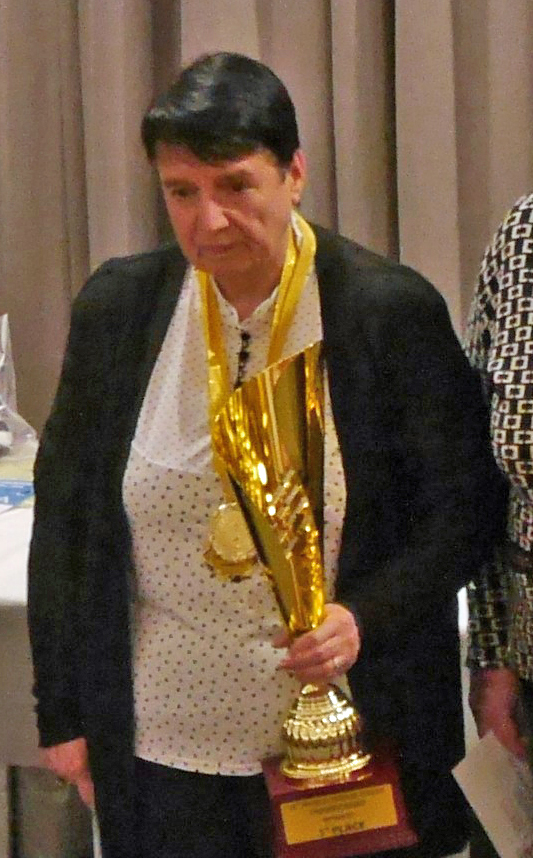 Nona Gaprindashvili, Siegerin 2016, Siegerehrung der Frauen Ü65, Schachweltmeisterschaft der Senioren 2016 in Marienbad.